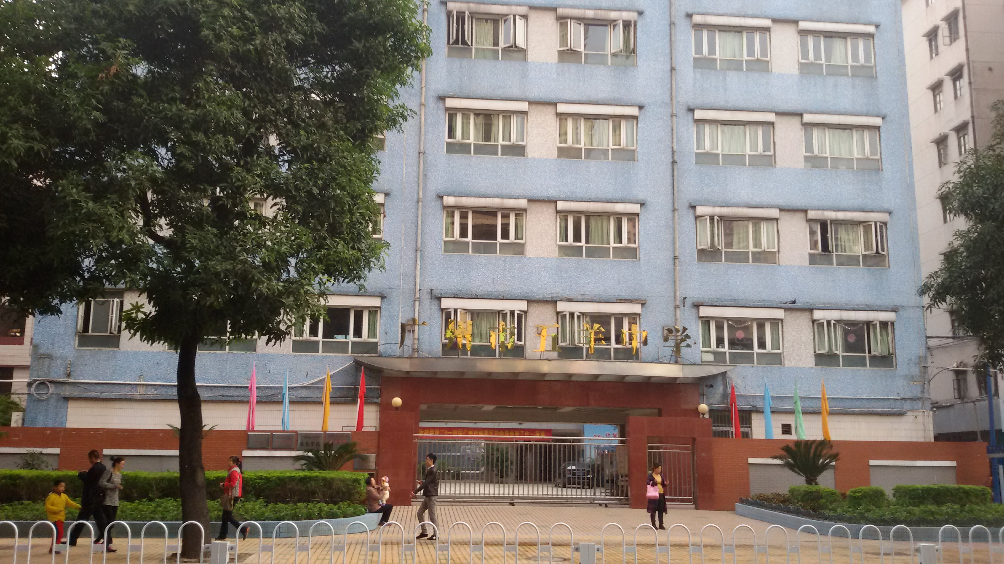 粵語: 广州市五羊中学嘅正门